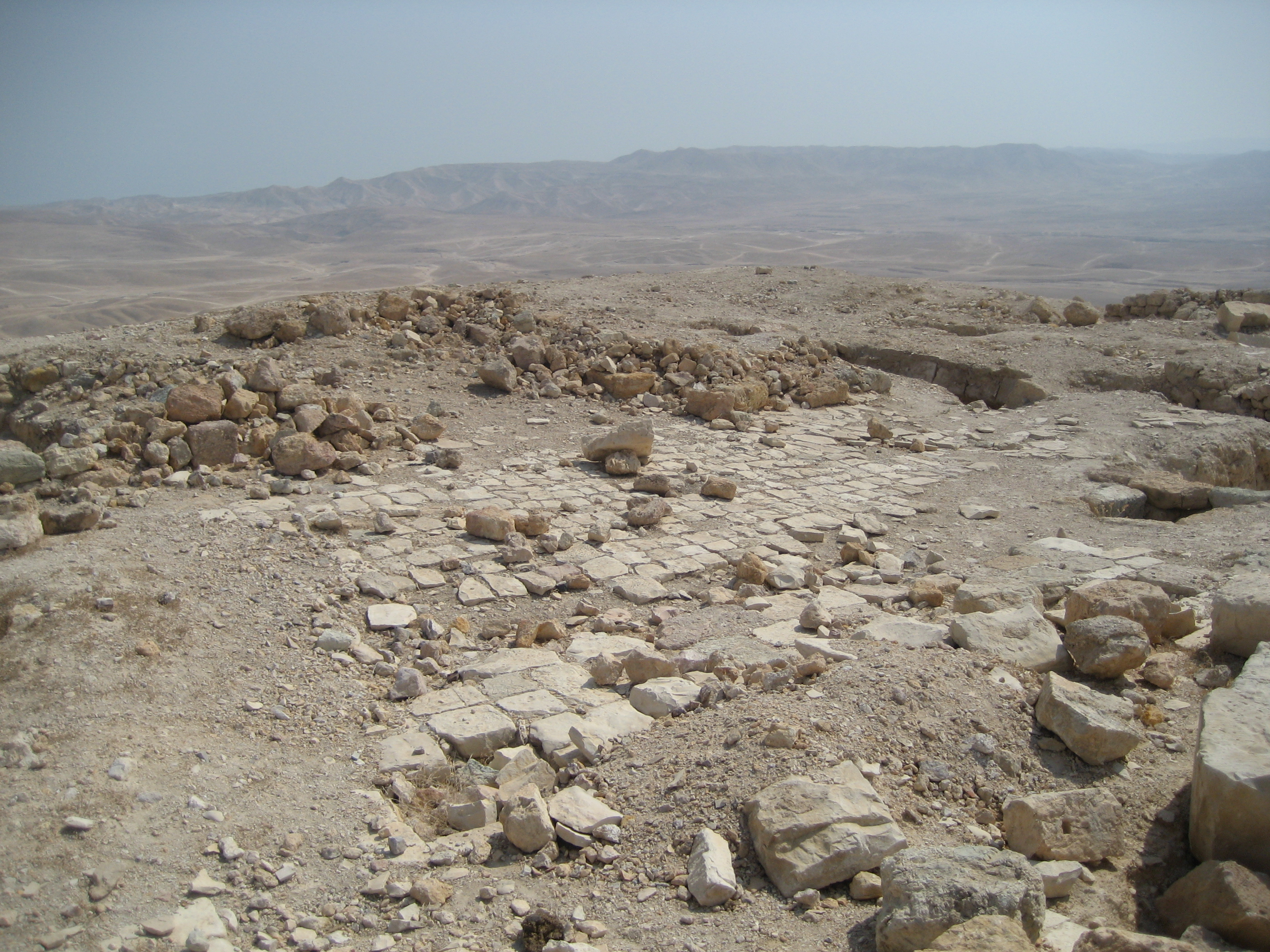 החלק העליון של מצודת הורקניה